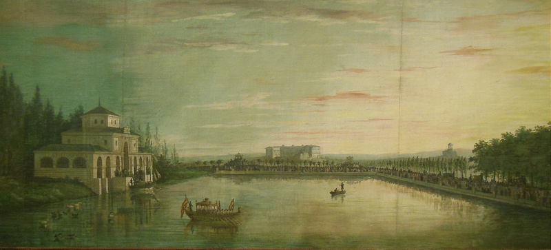 El Estanque Grande del Retiro (h. 1816). Temple sobre sarga, conservado en el Museo de Historia de Madrid. Puede verse a la izquierda el Embarcadero Real y al fondo la Real Fábrica de Porcelana del Retiro, ambas construcciones desaparecidas.